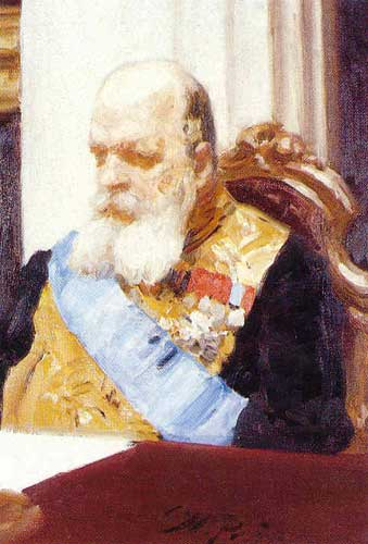 И.Е. Репин. (1844-1930). "Портрет графа Д.М. Сольского" 1901-1903